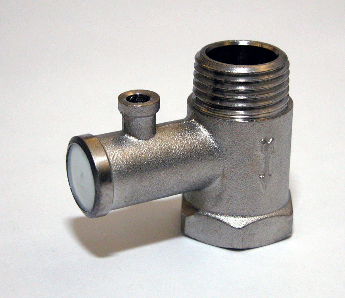 Válvula de alivio de presión. Vávula de alivio para calentadores de agua.